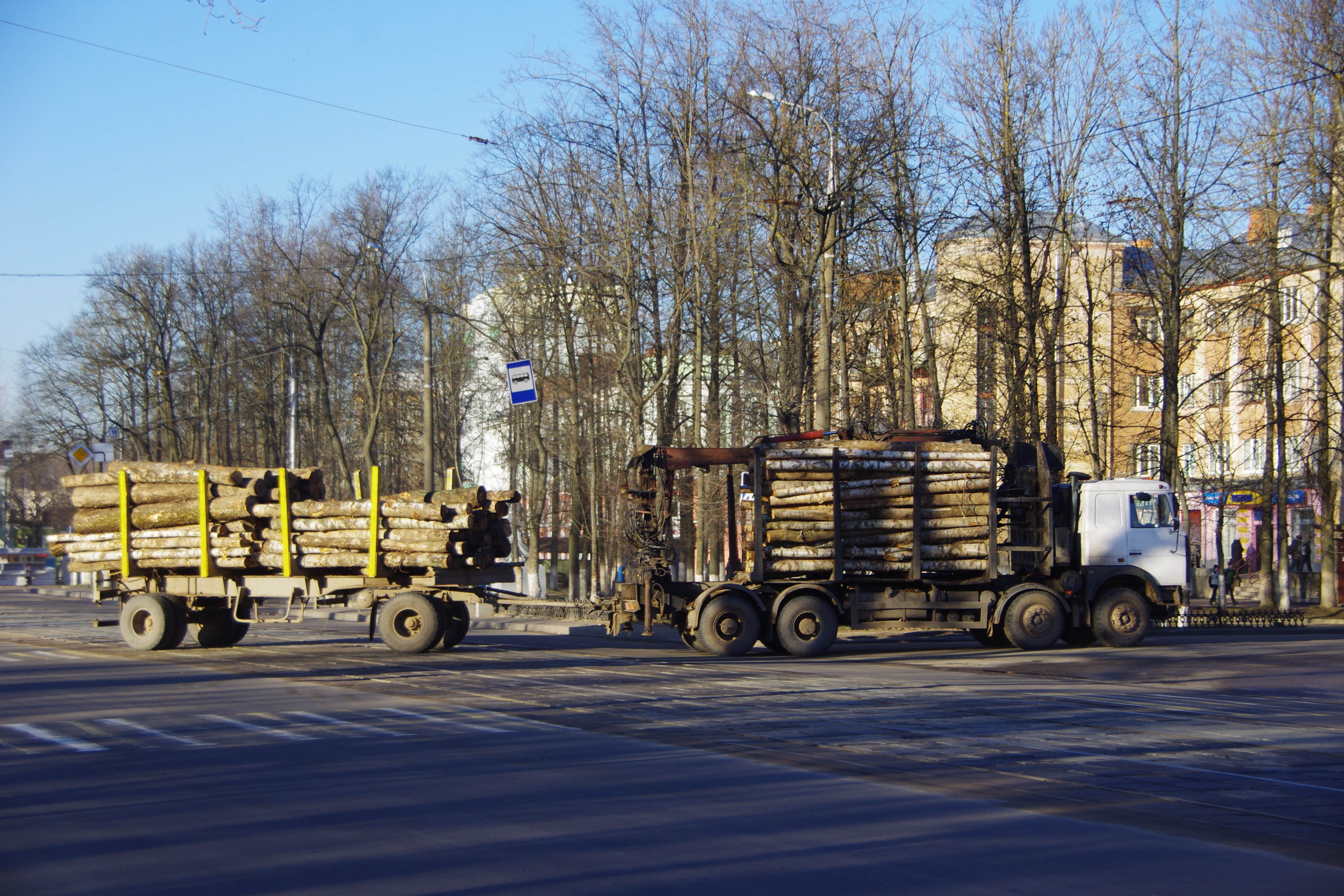 Pieršamajski rajon, Viciebsk, Belarus